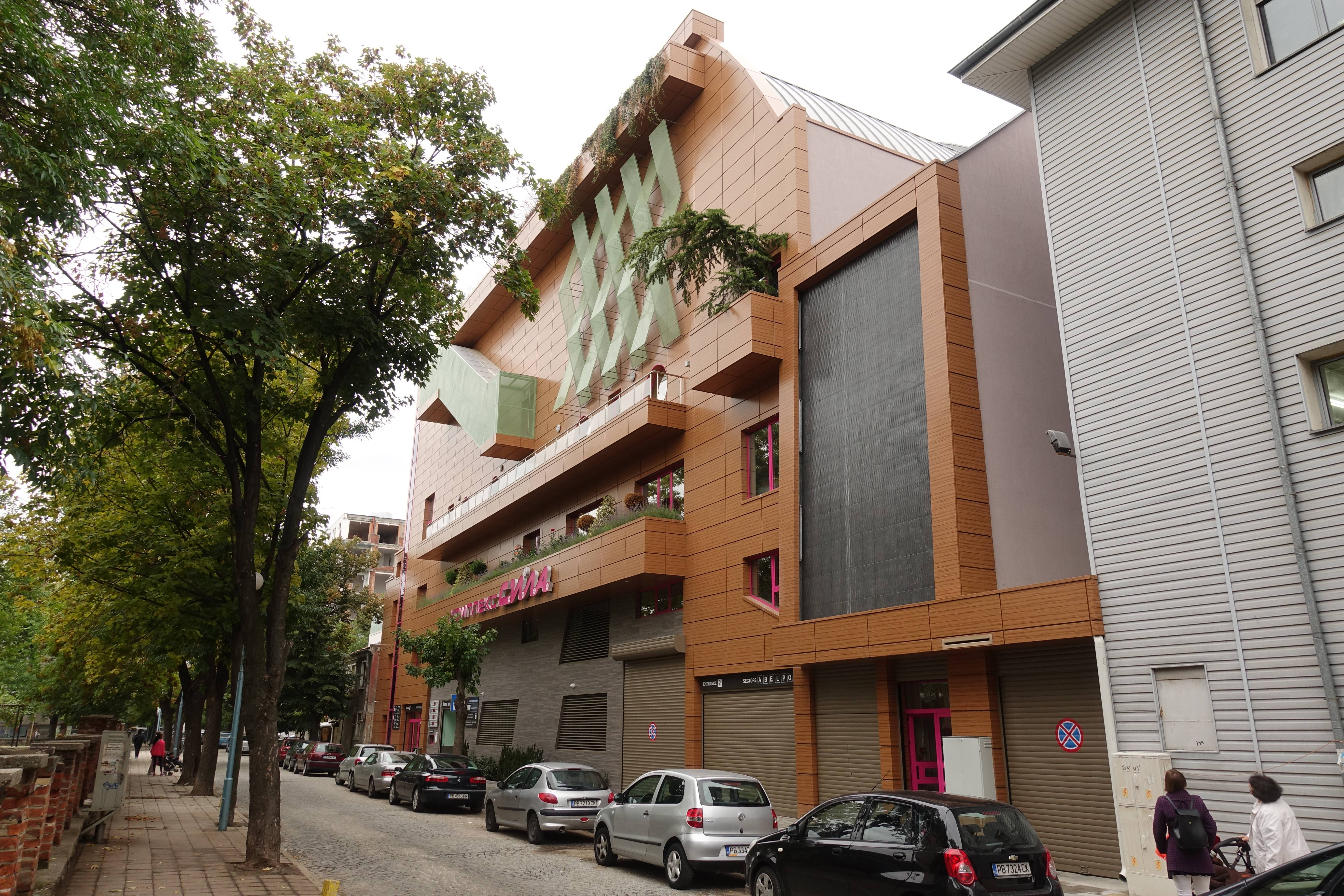 Комплекс С.И.²Л.А.